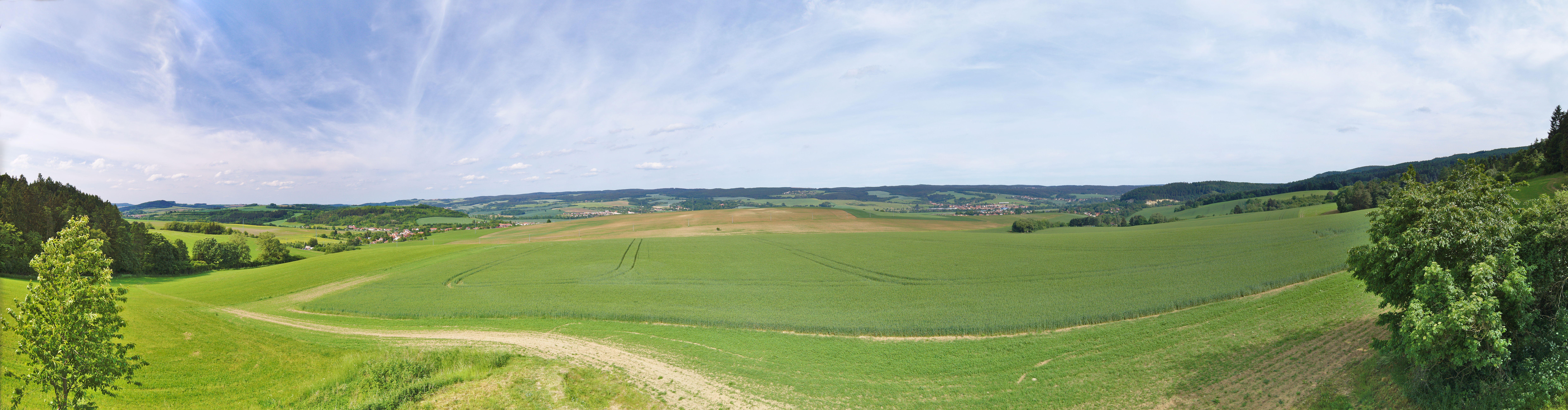 Panoramatický výhled na východ z rozhledny Spešov, okres Blansko